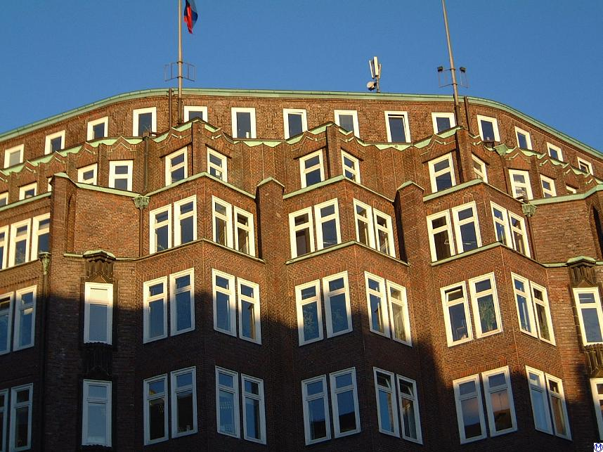 Dachkonstuktion am Montanhof, Hamburger KontorhausviertelThis is a photograph of an architectural monument.